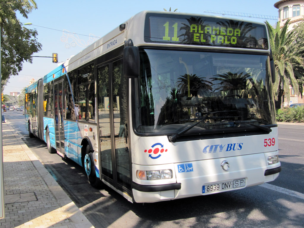 Autobús de la línea 11 de la EMT de Málaga a su paso por el Paseo del Parque.